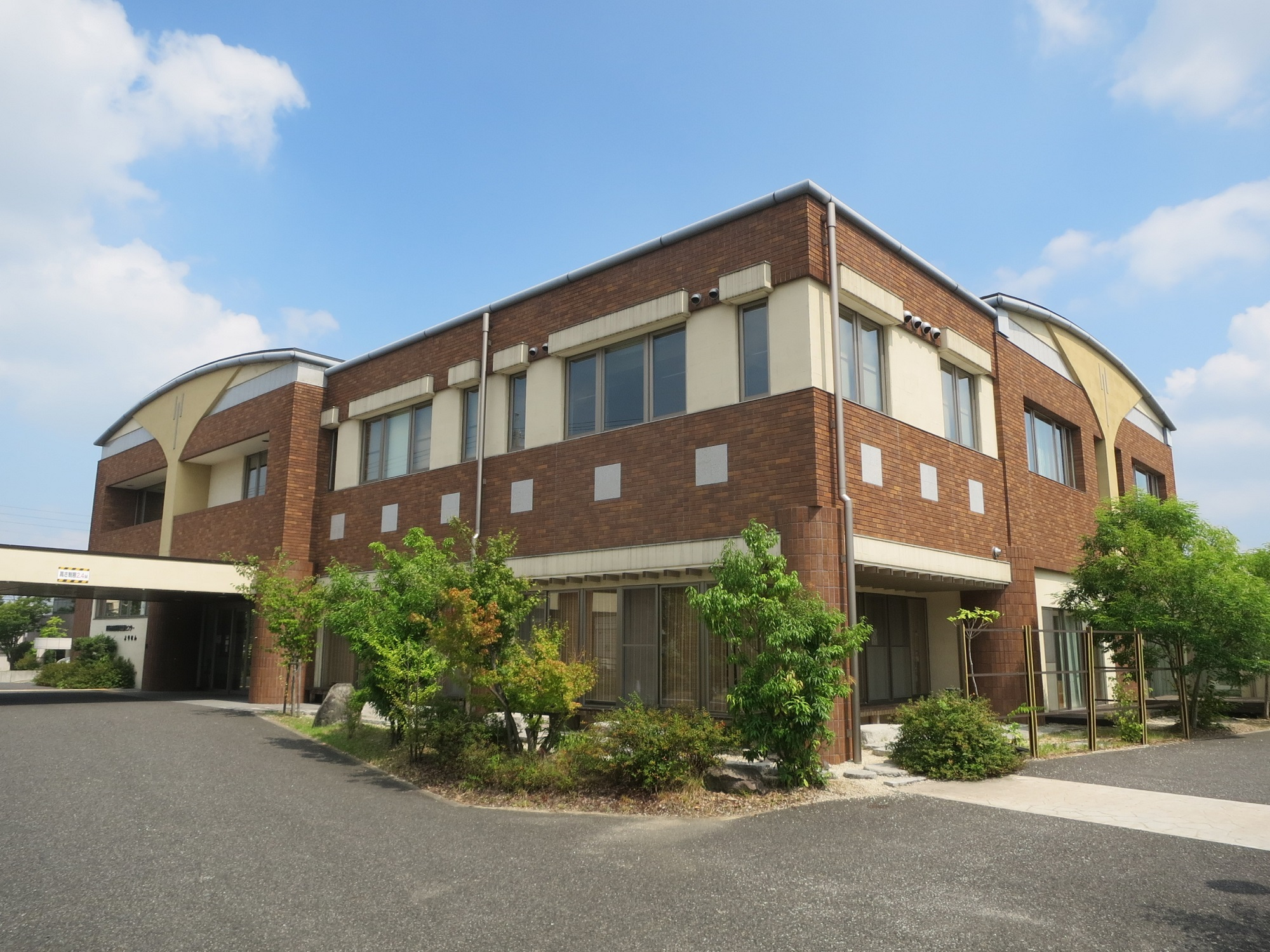 岡崎市南部地域交流センター・よりなん